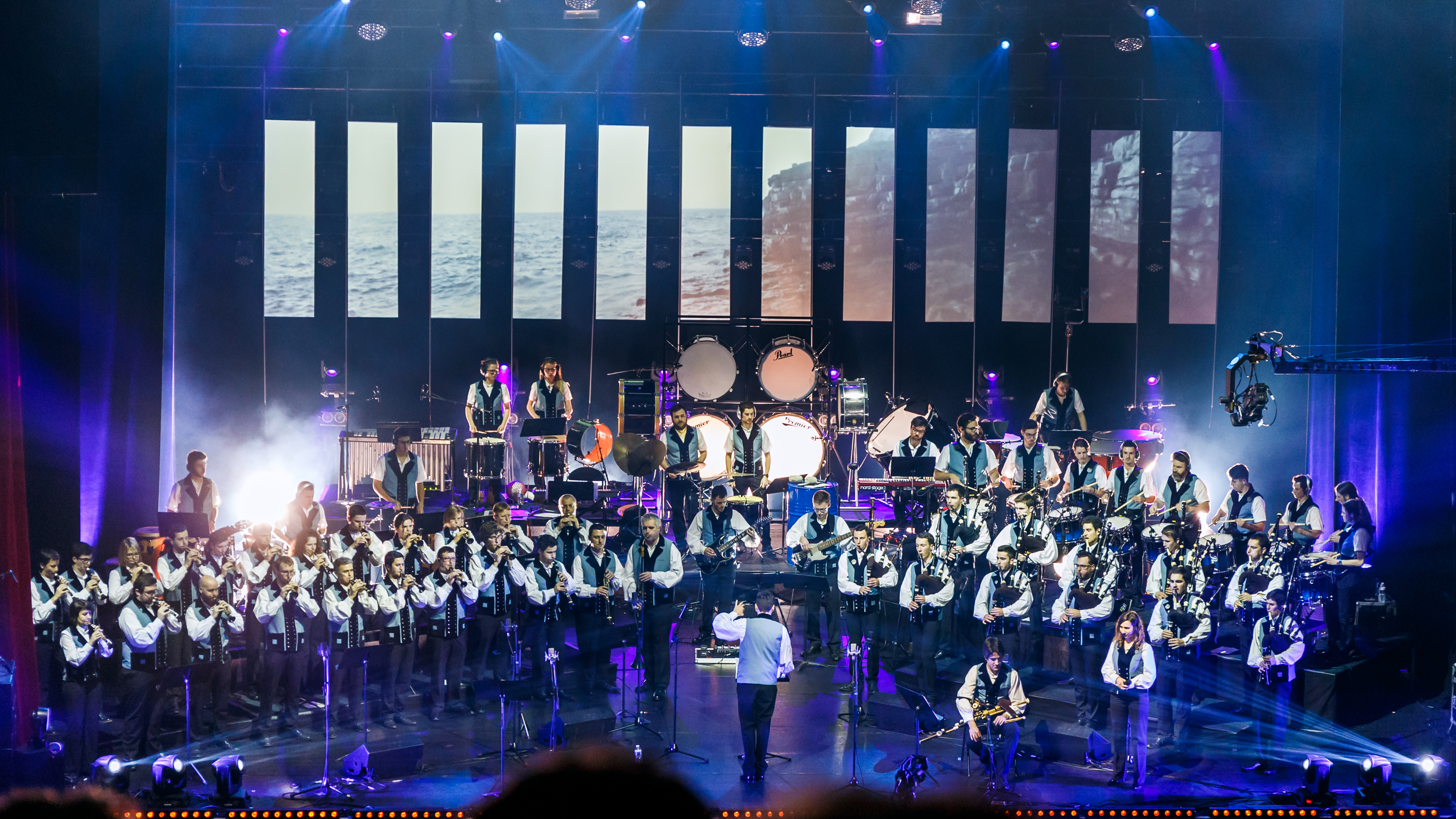 Le bagad Melinerion de Vannes sur la scène de L'Olympia à Paris avec sa superproduction Contrechamp le 5 février 2017.